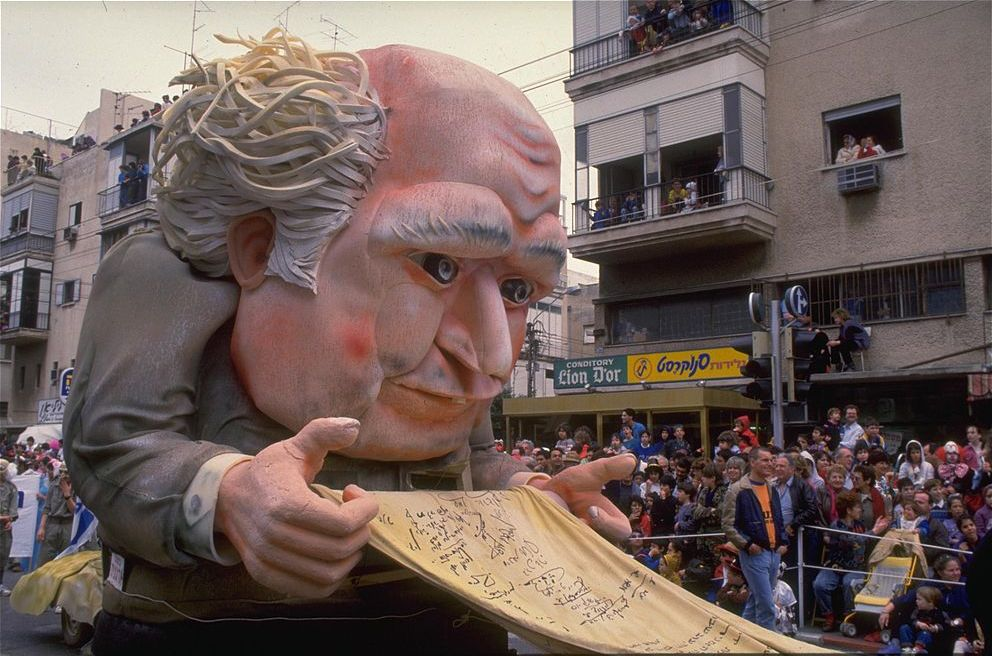 Purim in Tel Aviv. In the photo, a huge doll in the figure of David Ben Gurion, participating in the Adloyada Parade. פורים בתל אביב. בתמונה: בובת ענק של דוד בן גוריון בתהלוכת העדלאידע בתל אביב